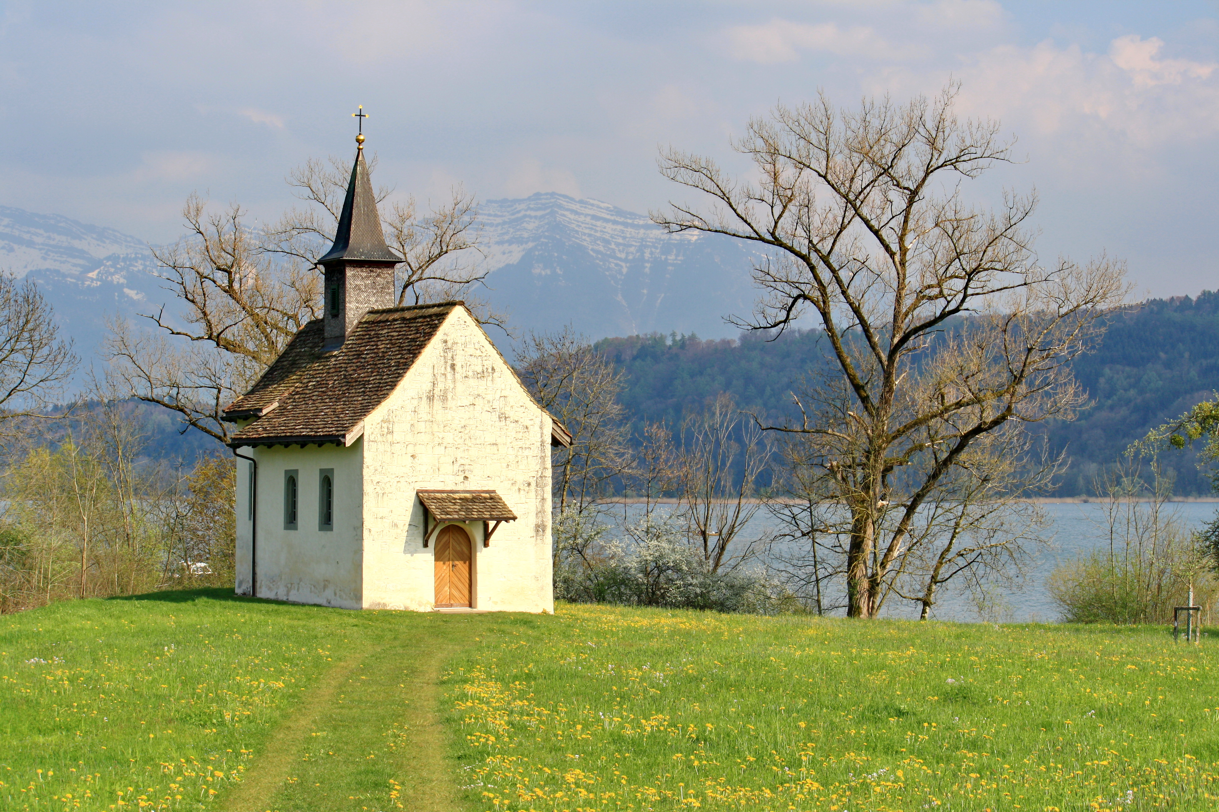 St. Meinrad Kapelle in Bollingen on Obersee (upper Lake Zürich) shore